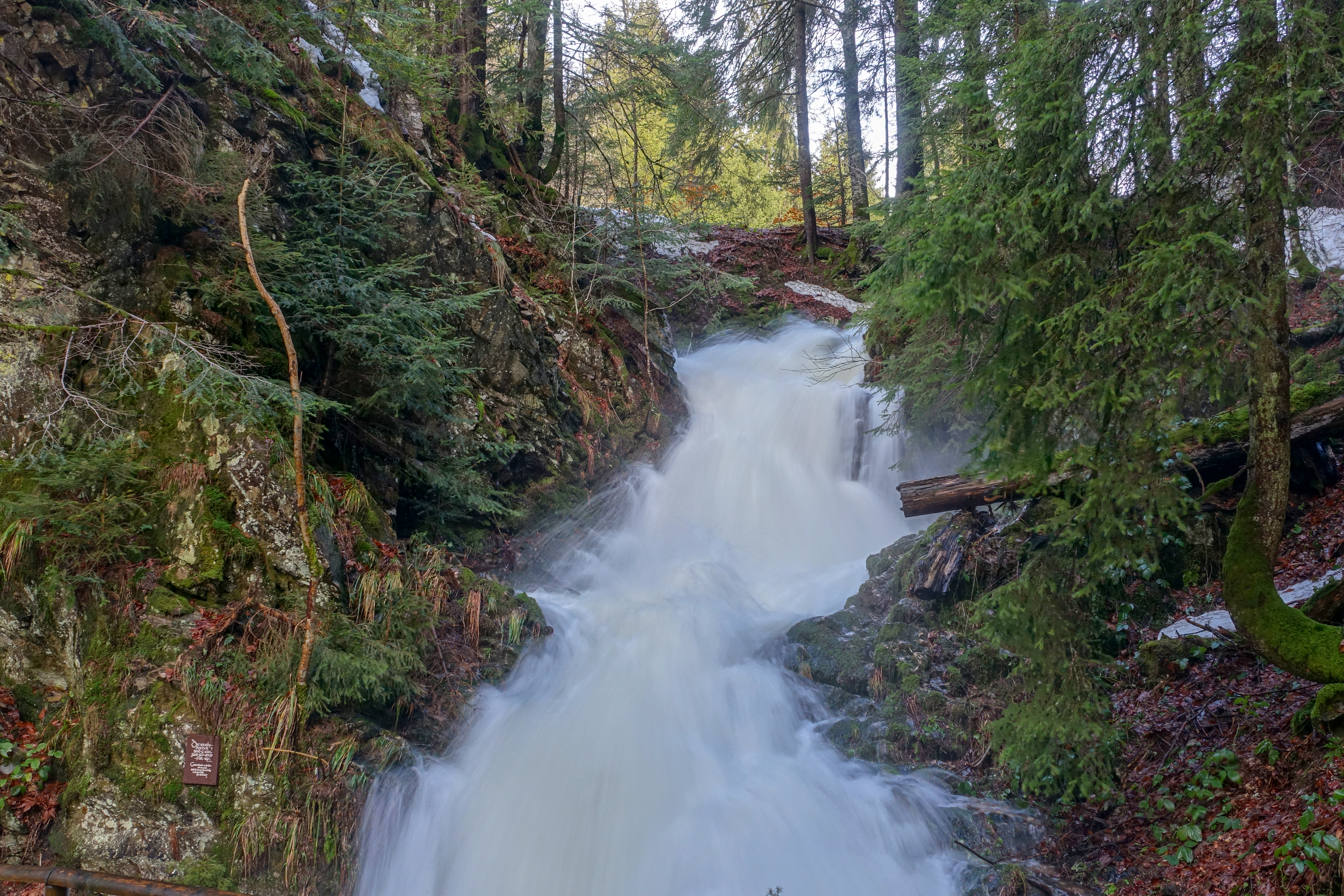 Todtmooser Wasserfälle